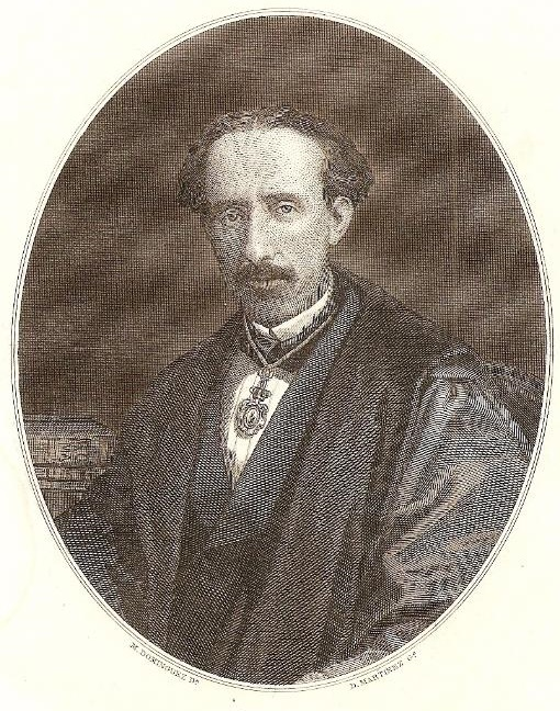 Severo Catalina, grabado de Domingo Martínez por dibujo de Manuel Domínguez, anteportada de Roma, Madrid, Imprenta y Estenotipia de Ribadeneyra, 1873